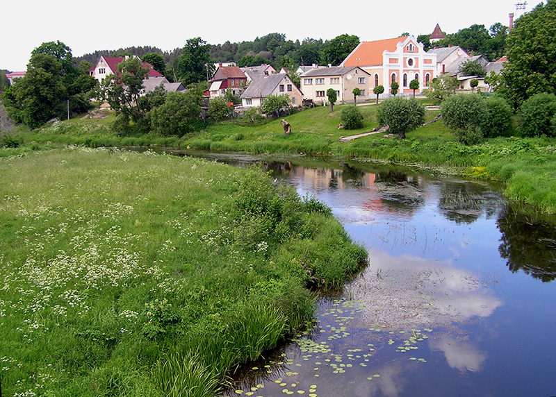 Sabile, skats uz abavu un ēbreju sinagogu